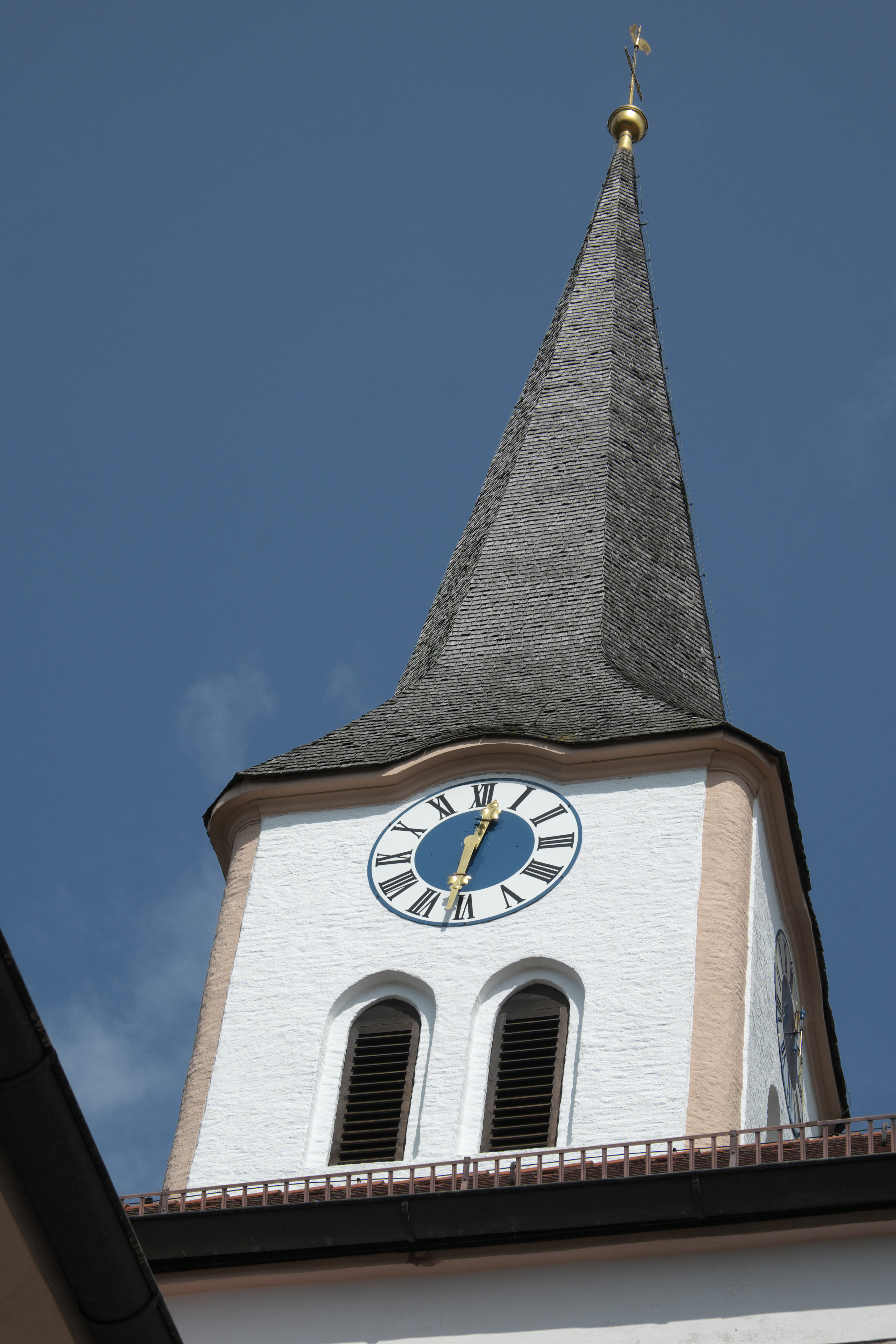 Katholische Pfarrkirche Johannes Baptist und Johannes Evangelist in Steinkirchen im Landkreis Erding (Bayern/Deutschland), Kirchturm